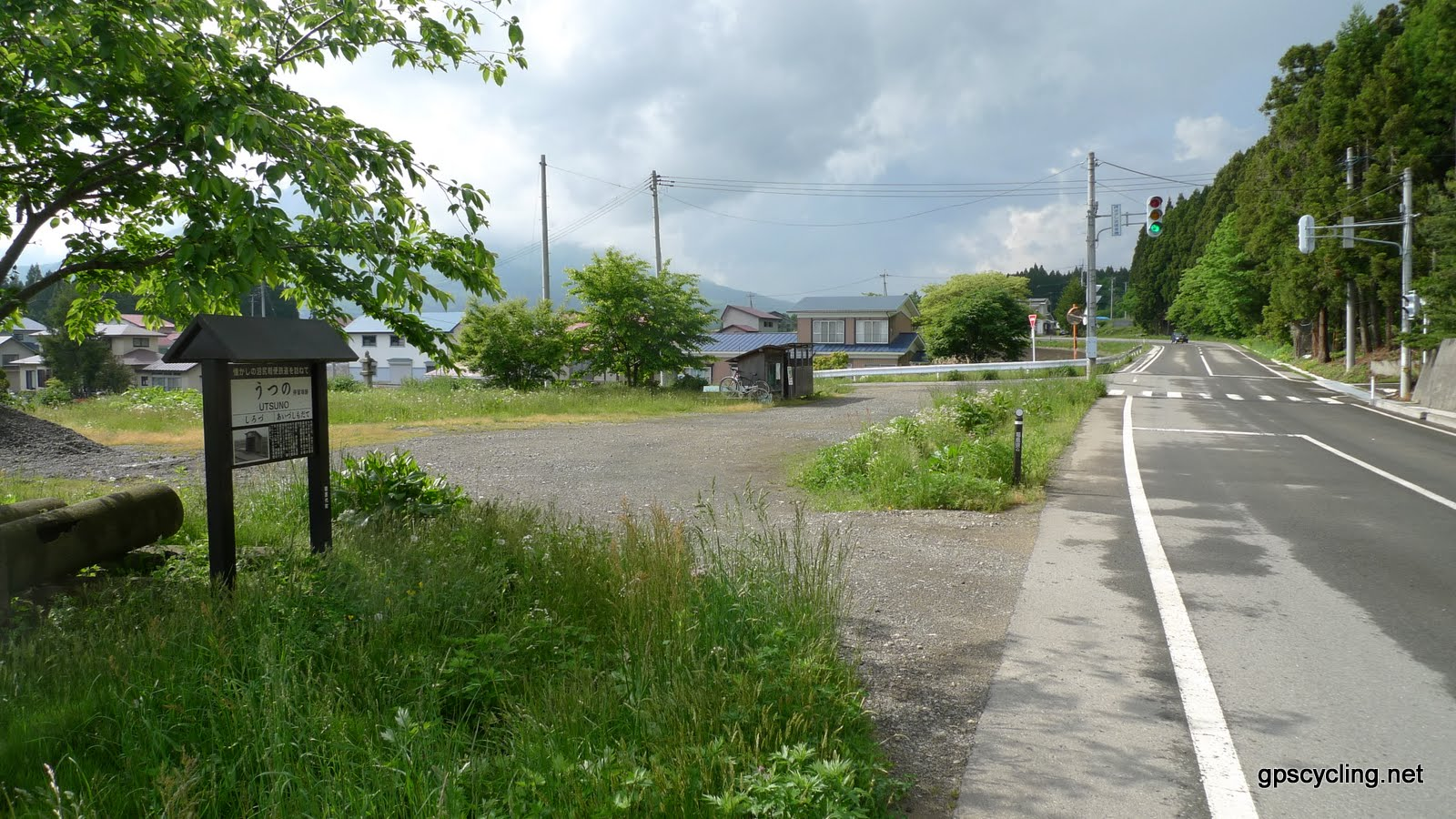 沼尻鉄道内野駅跡